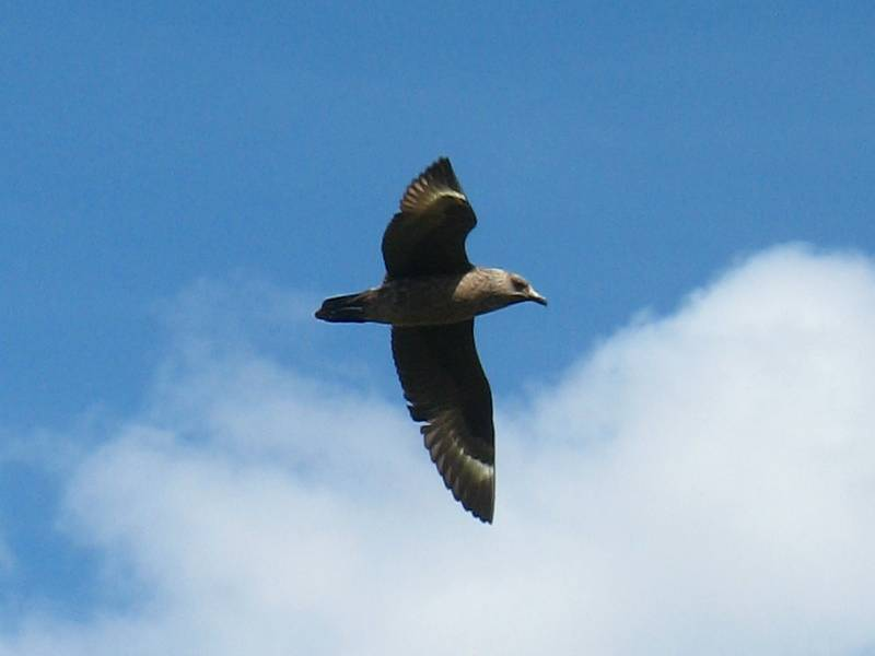 Großer Skua(Stercorarius skua)